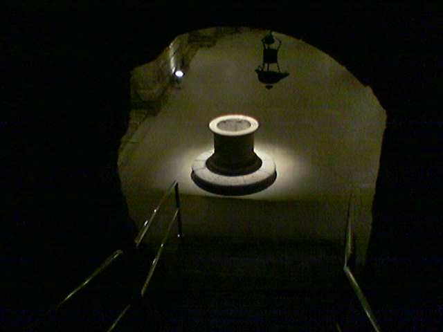 cripta de san antolín en la catedral de Palencia (España)